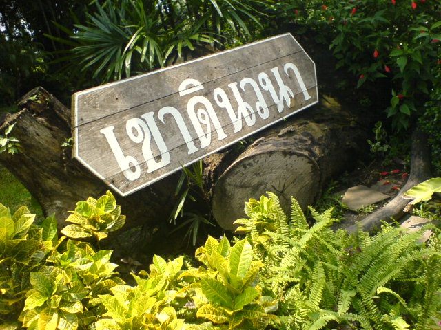 Dusit Zoo เขาดินวนา